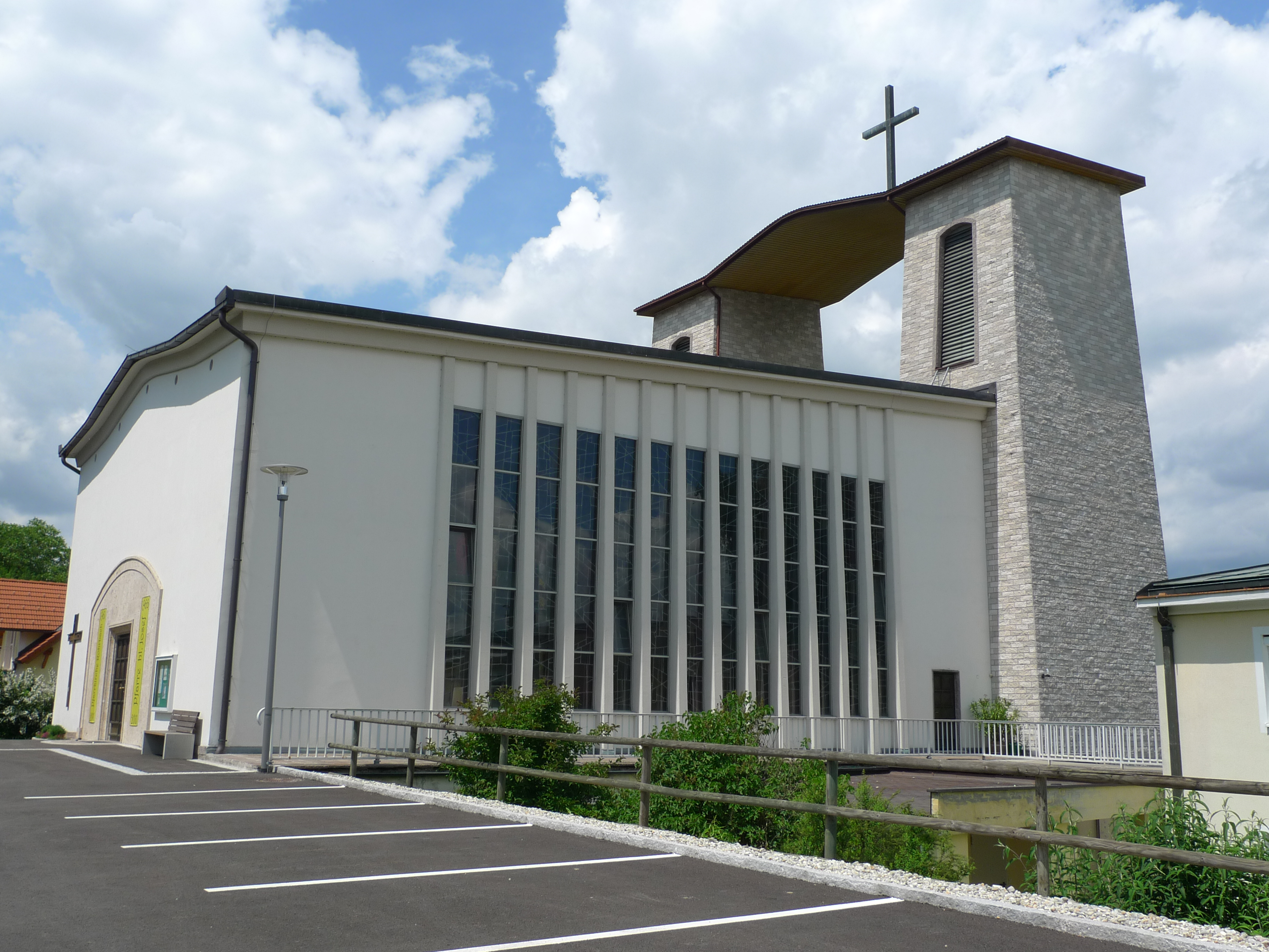 Kath. Pfarrkirche hl. Joseph der Arbeiter, Rohbach an der Lafnitz.